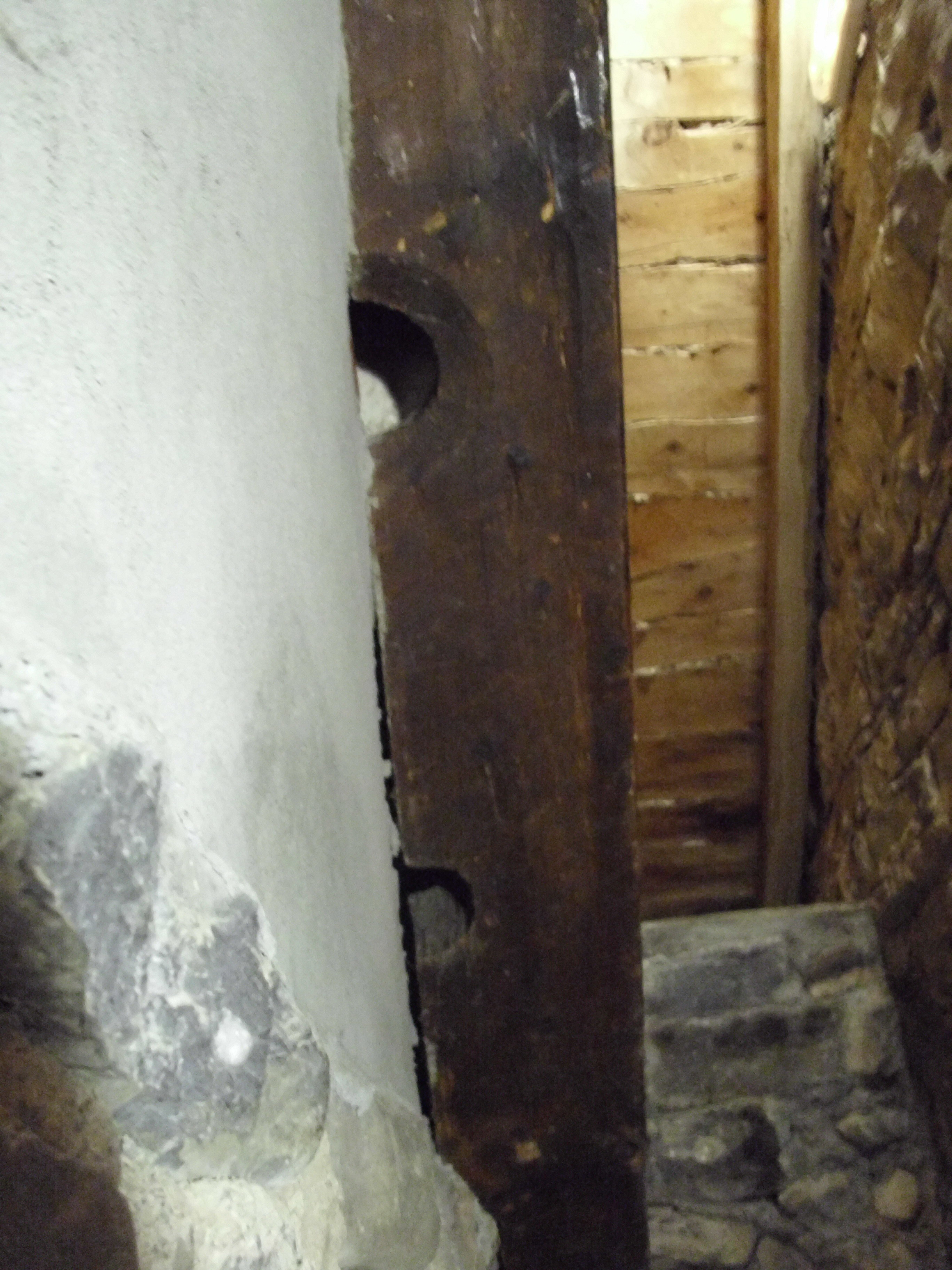 Cepo de tortura ubicado en las escaleras de la cárcel de Broto.